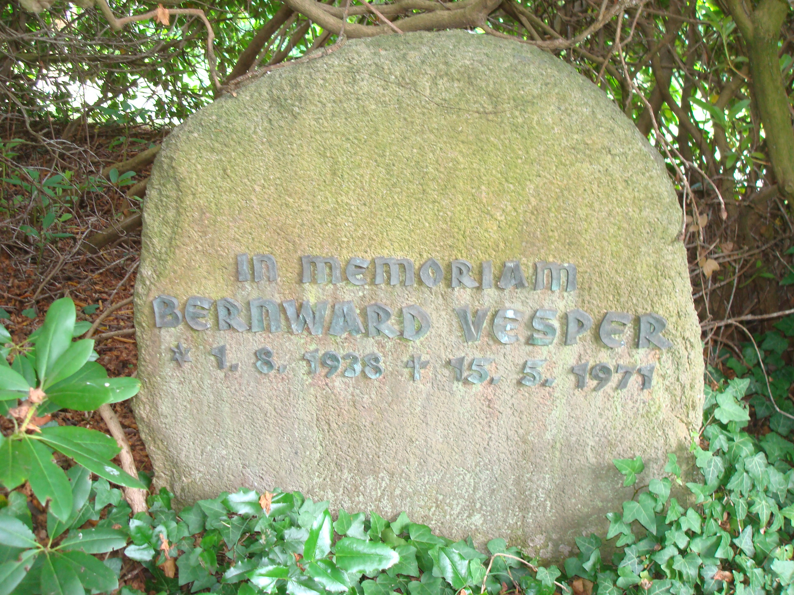 Gedenkstein für Bernward Vesper auf der Familiengrabstätte im Park des Gutshofs in Triangel, Kreis Gifhorn, Niedersachsen